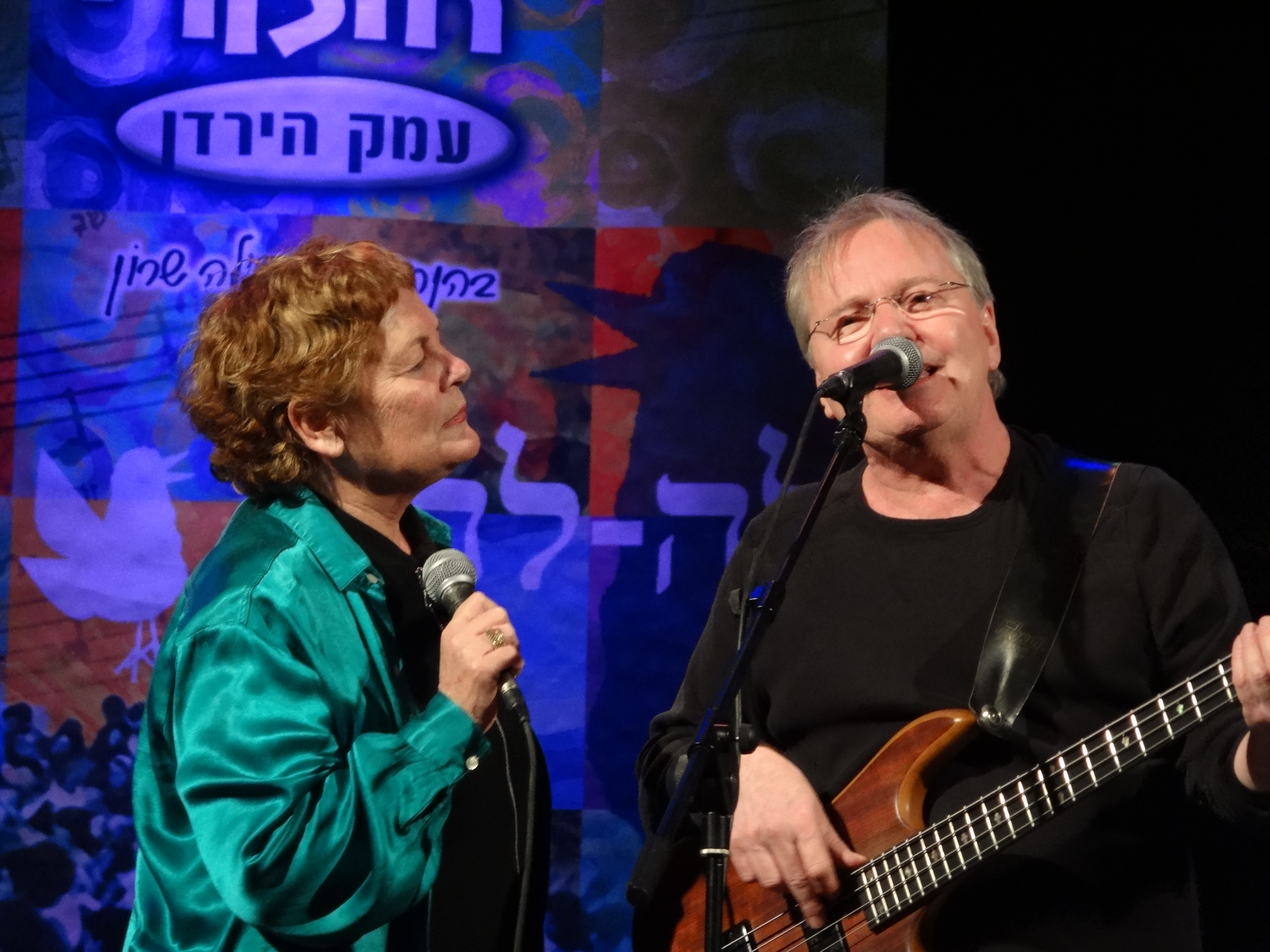 Alon Oleartchik אלון אולארצ'יק בהופעה במועדון הזמר עמק הירדן יחד עם שרלה שרון